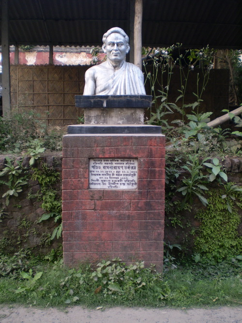 ramnarayan tarkoratna